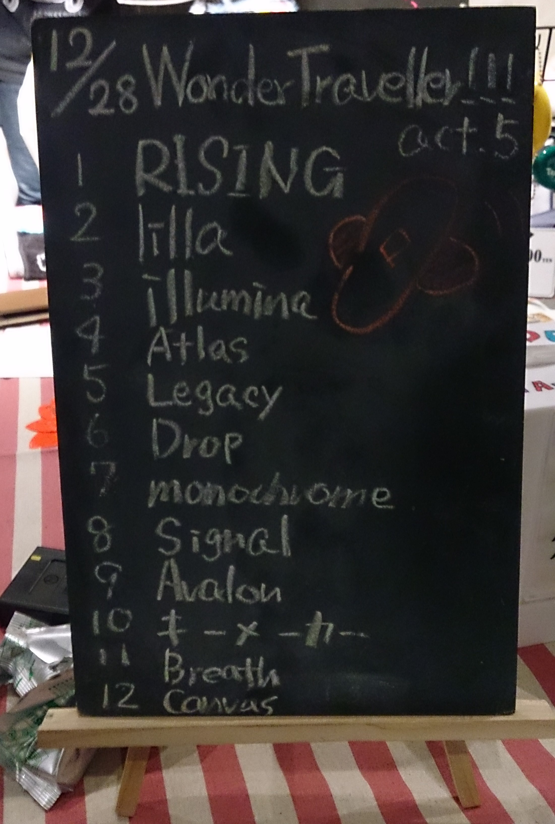 amiinAセトリボード(20161218(1))